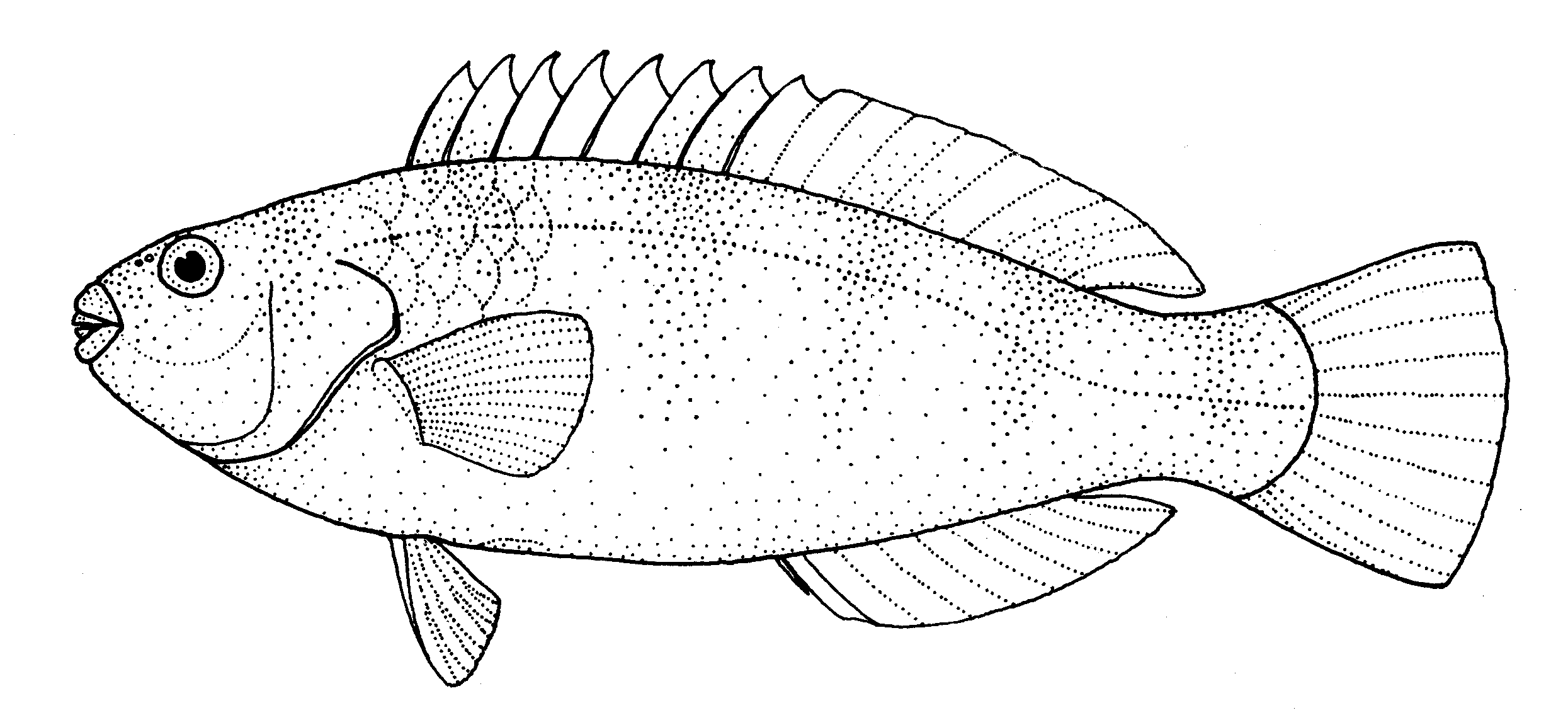 Leptoscarus vaigiensis (marbled parrotfish)